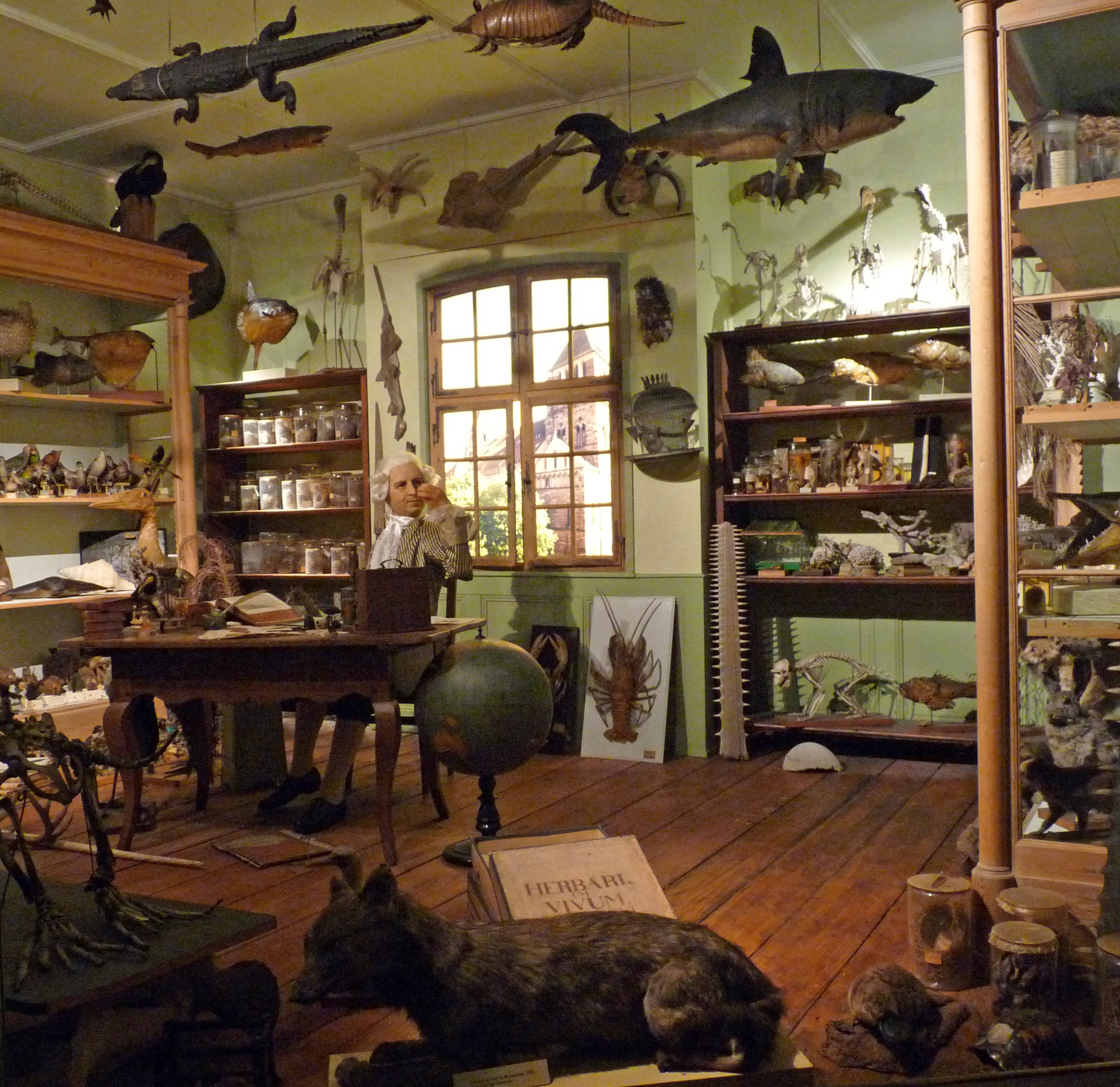 Reconstitution du cabinet du professeur Jean Hermann au Musée zoologique de Strasbourg.